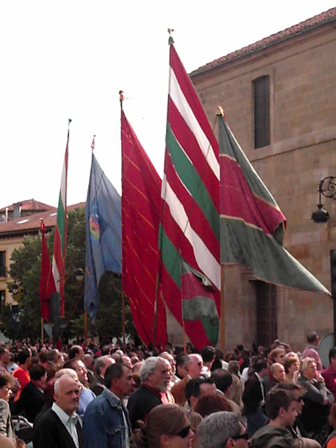 Pendones de León. Fiesta de San Froilán del 2006.